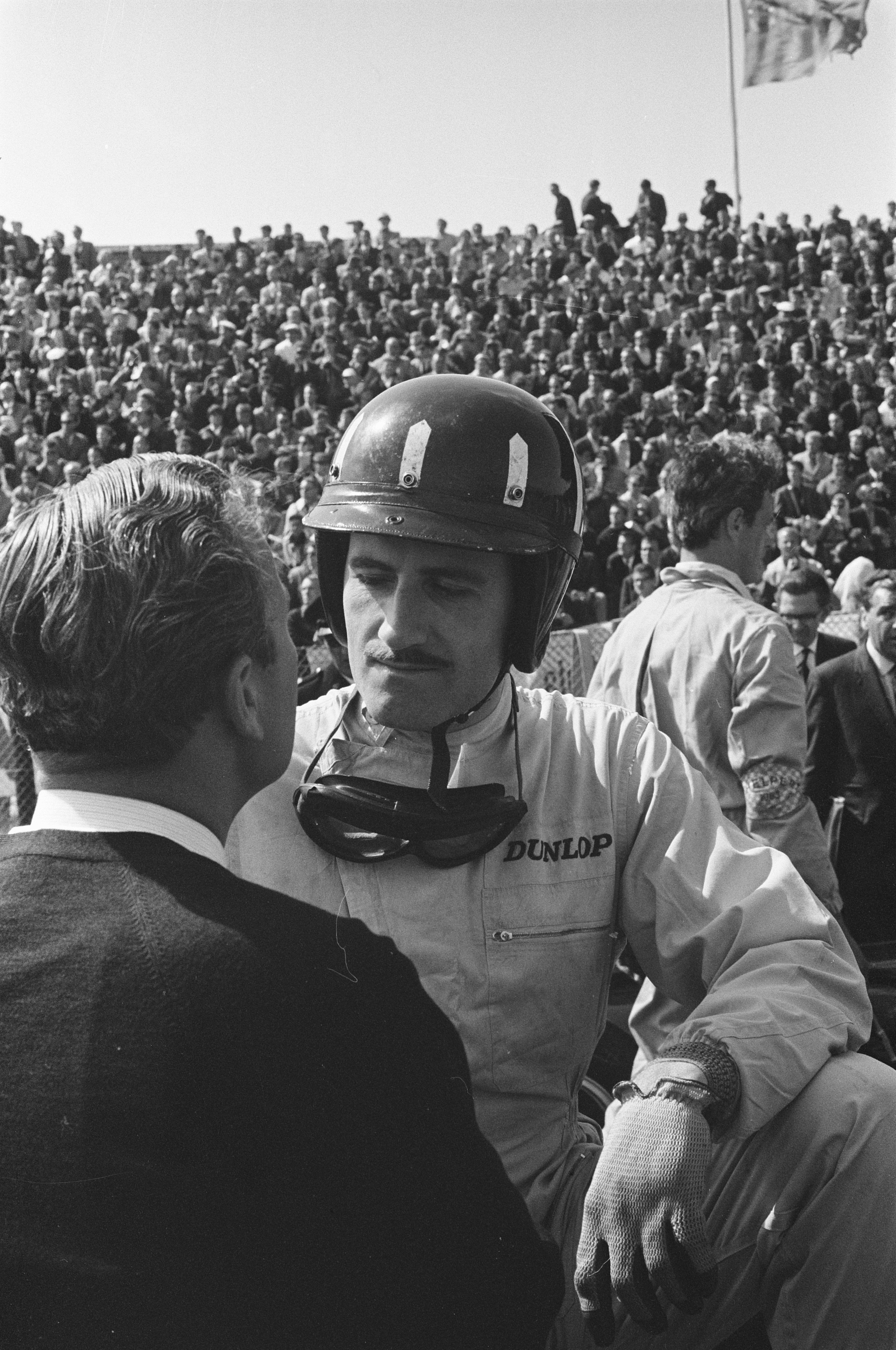 Grand Prix te Zandvoort. Nummer 16, 17 rennersveld in de bocht.